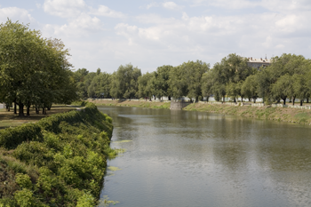 Kharkov river in Kharkov City. 2006